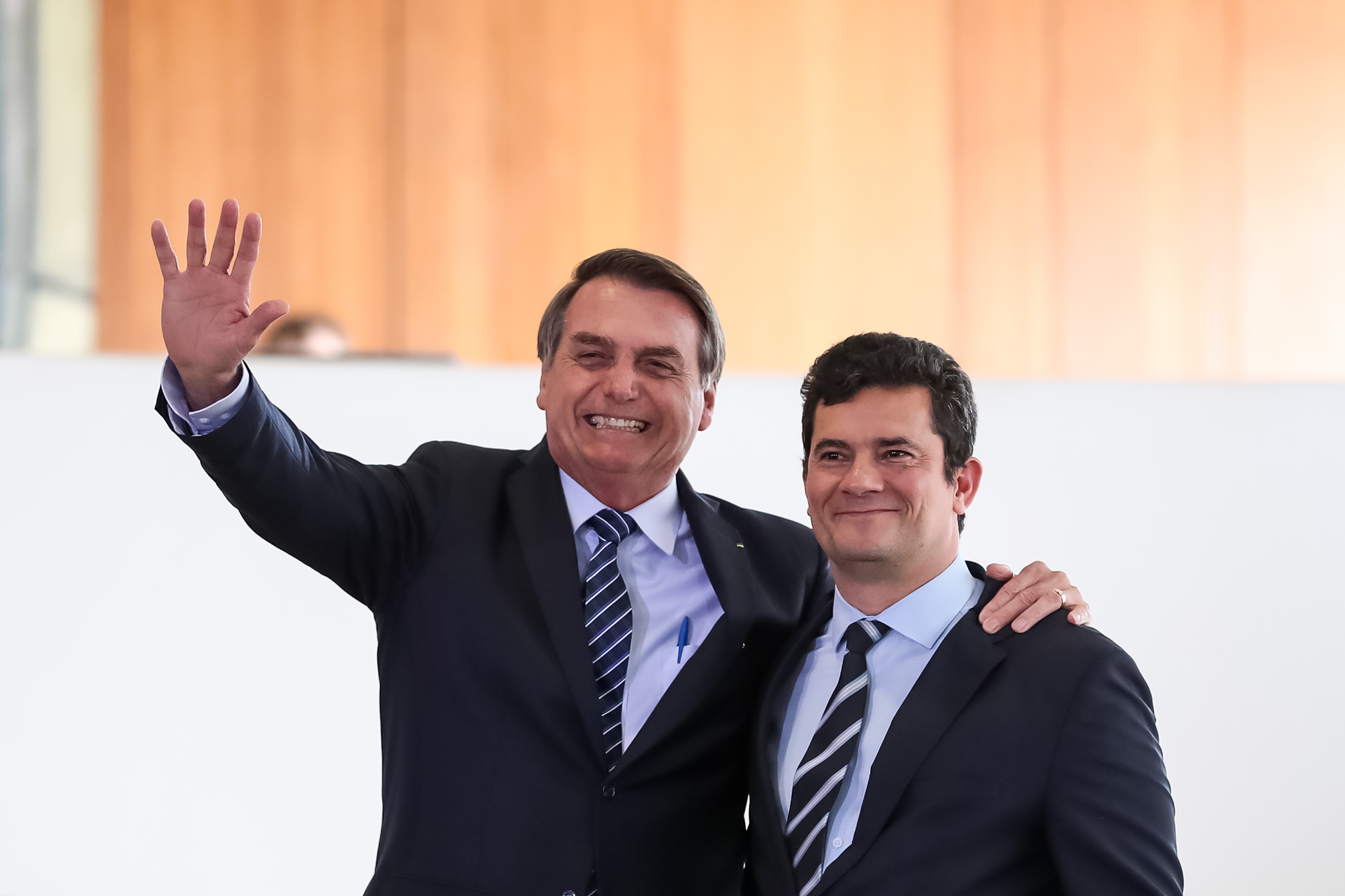 (Brasília - DF, 29/08/2019) Solenidade de Lançamento do Projeto em Frente Brasil. Foto: Marcos Corrêa/PR